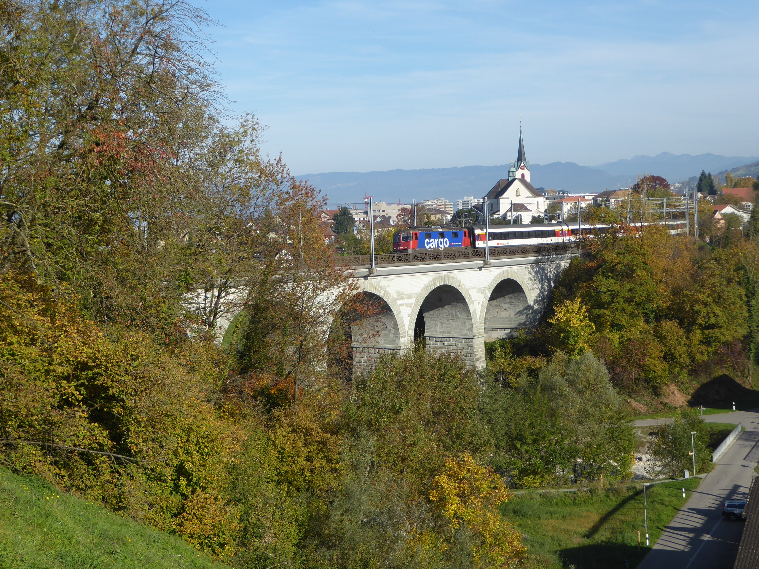 Goldachviadukt mit SBB Re 4/4 II und Eurocity München–Zürich